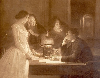 Auguste Comte et ses trois anges: Clotilde de Vaux, Rosalie Boyer, Sophie Bliaux